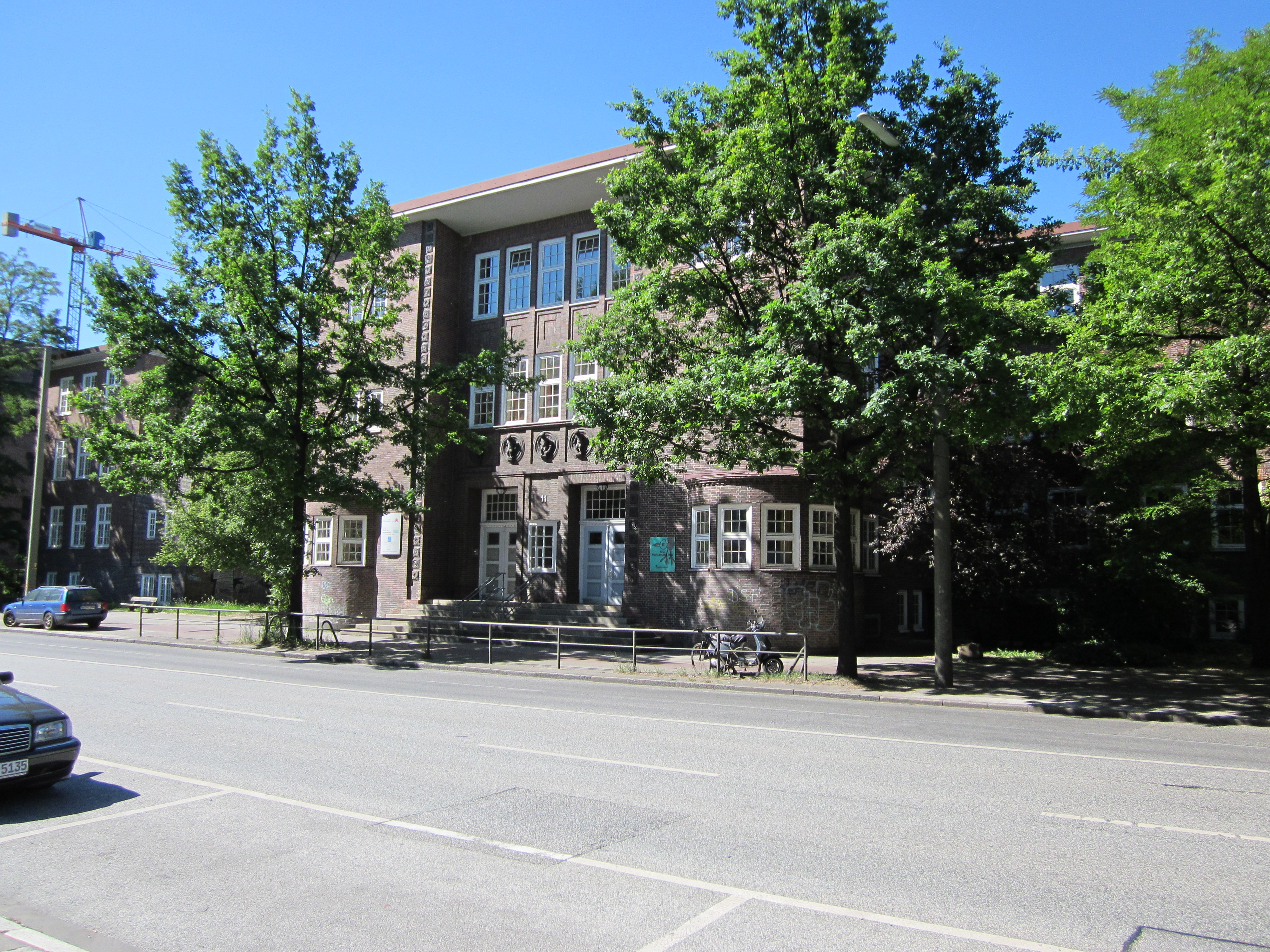 Die heutige Kindertagesstätte Winterhuder Weg auf der Uhlenhorst wurde 1914-16 nach Plänen von Fritz Schumacher als Kleinkinderhaus des Hamburger Waisenhauses errichtet.